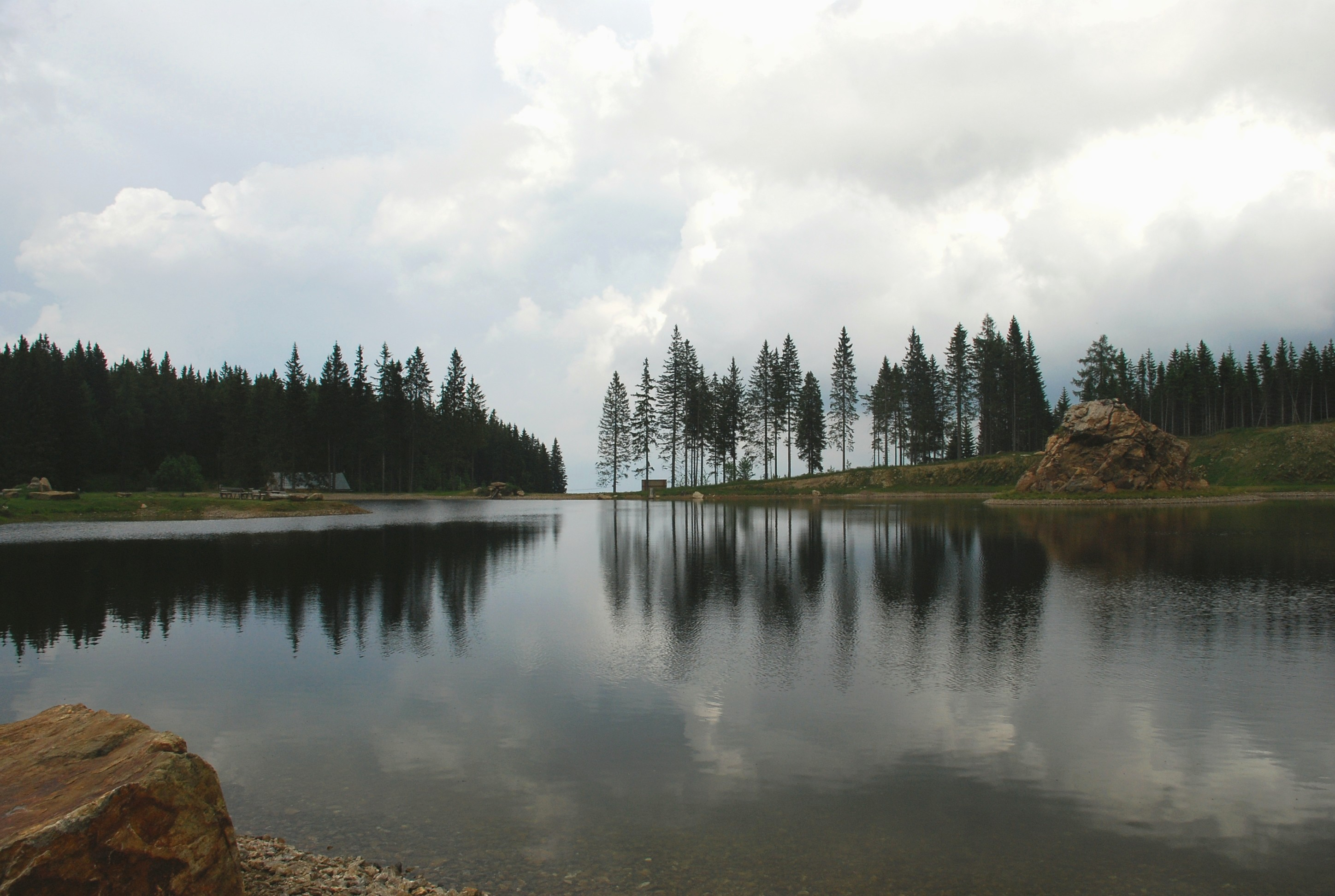 See beim Schigebiet Hebalm